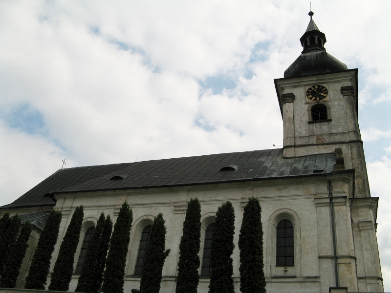 Kostel sv. Martina (Klenčí pod Čerchovem), náves, Klenčí pod Čerchovem